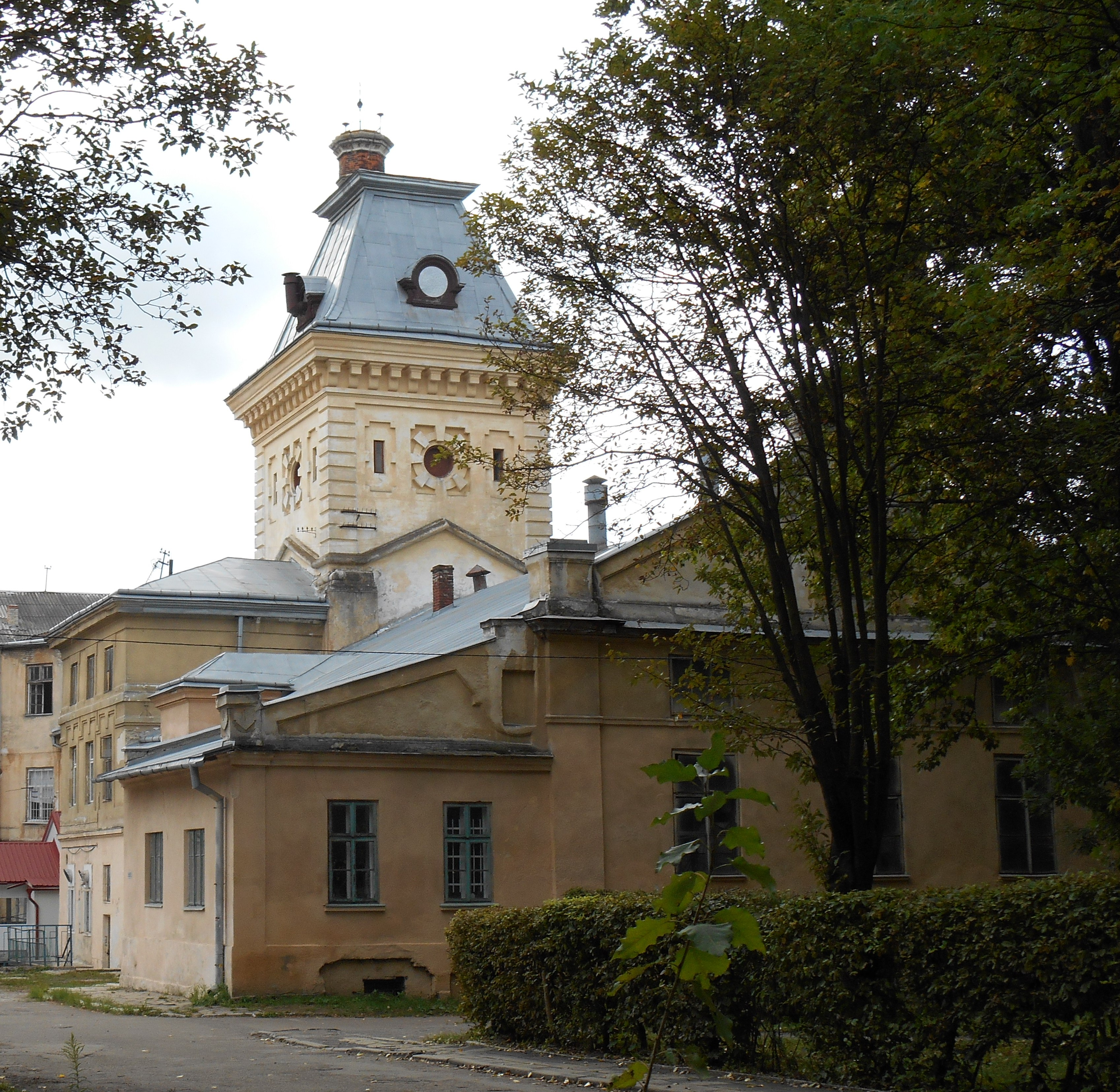 обласна психіатрична лікарня, Львів, Кульпарківська, 95